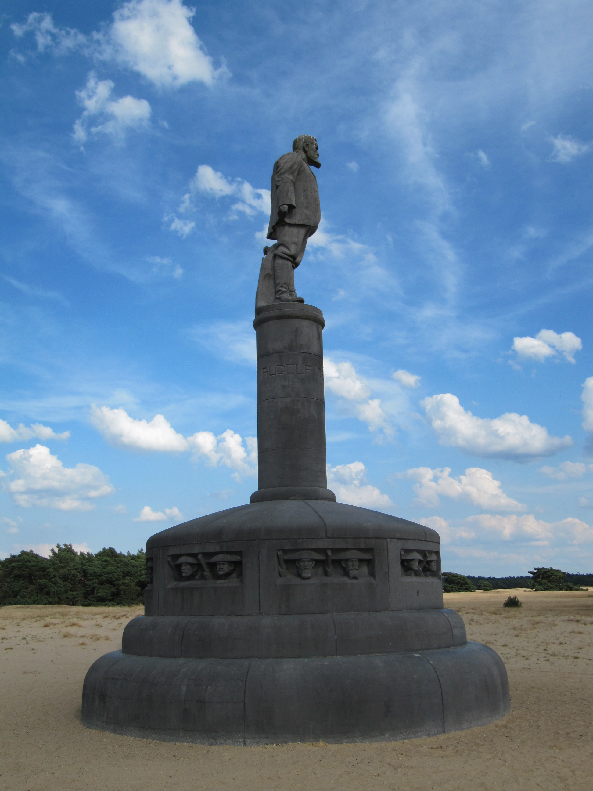 Standbeeld van De Wet in Hoge Veluwe